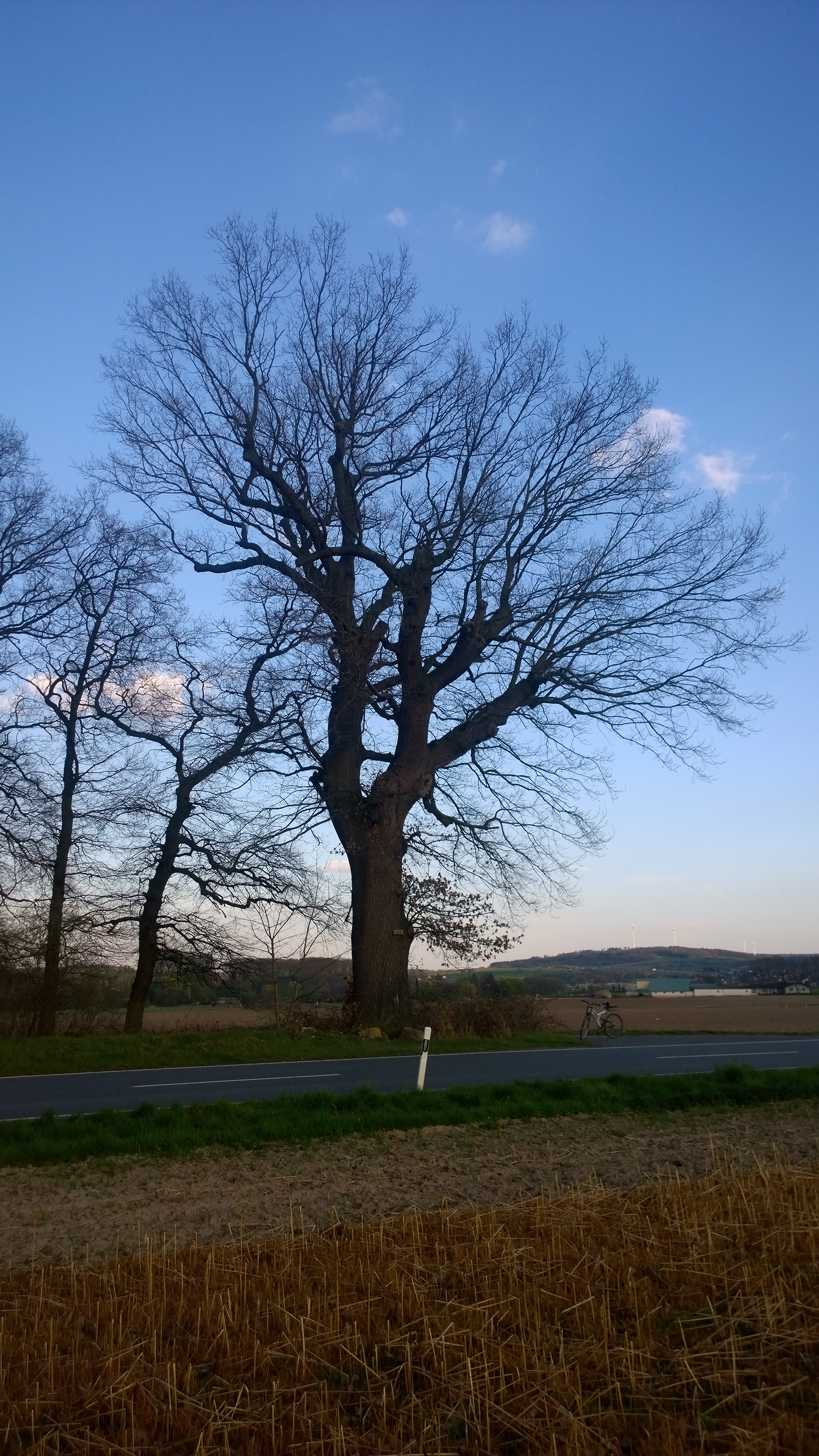 Die "Zigeuner Eiche", Naturdenkmal, an der Straße Richen - Altheim, Gemarkung Richen, Stadt Groß-Umstadt; Blick nach Klein-Umstadt zum Binselberg im beginnenden Odenwald, Windrad-Standort